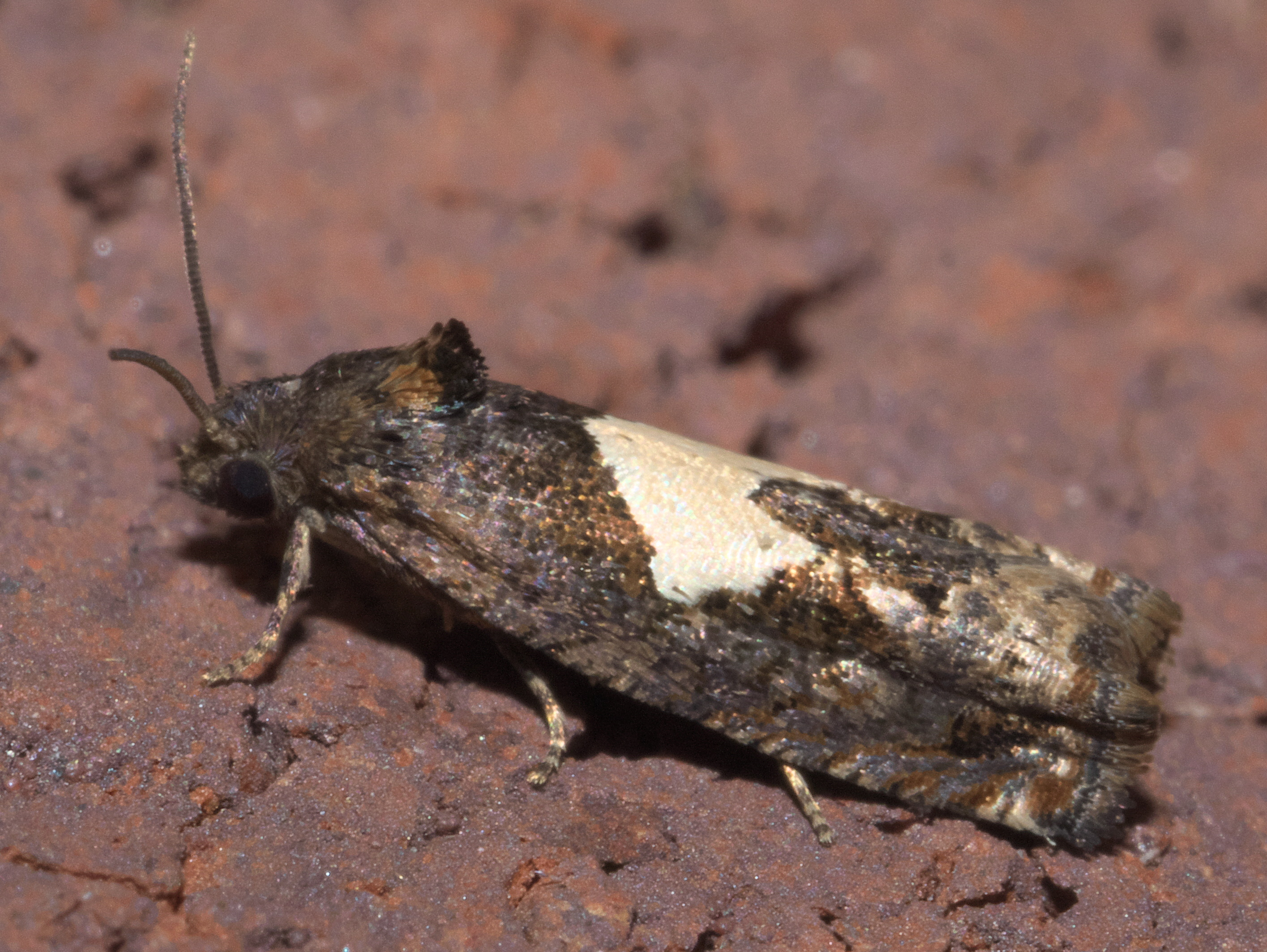 Epiblema otiosana, bidens borer, Size: 8.3 mm, ID Confidence: 87